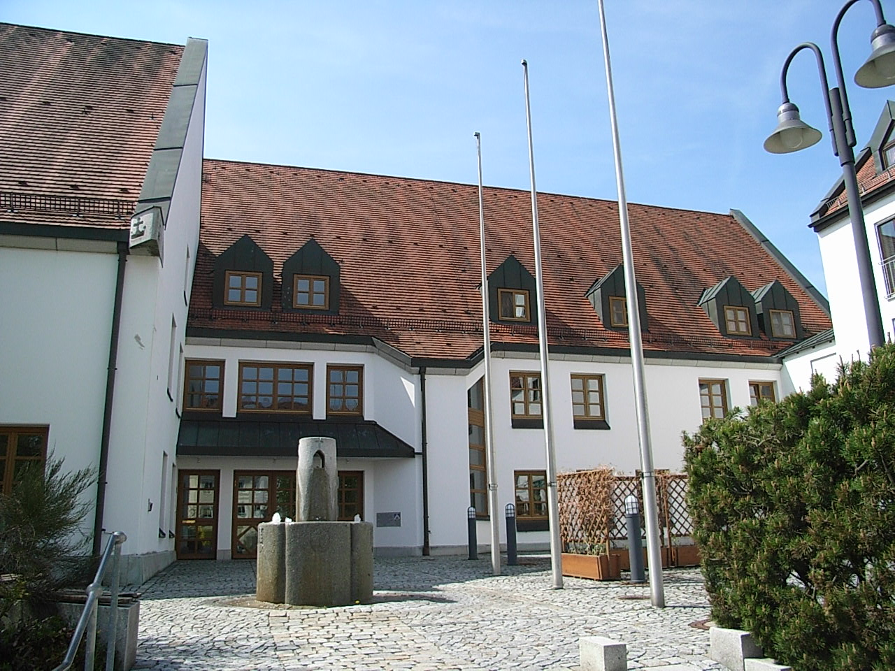 Das Rathaus von Fürstenzell